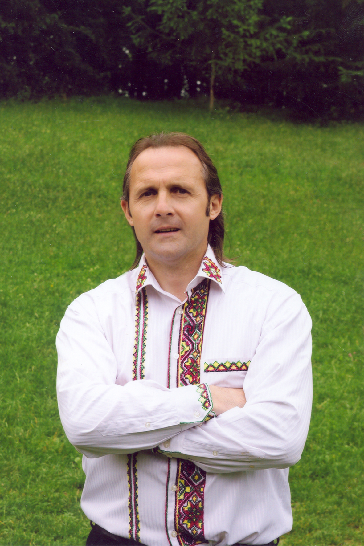 Творчість